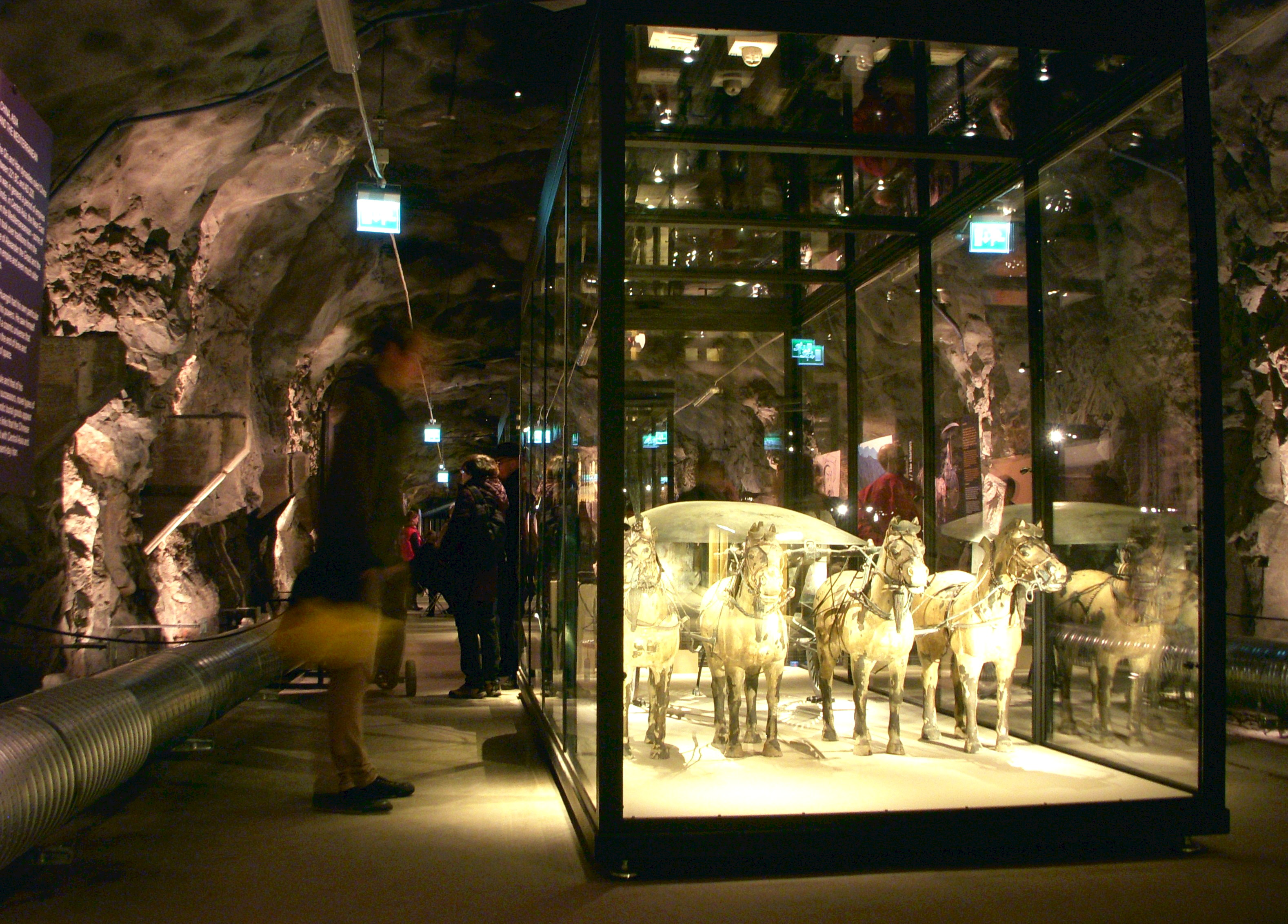 Utställningen för Terrakottaarmén i bergrummet på Skeppsholmen